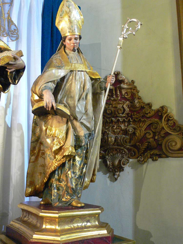 Talla barroca de San Isidoro realizada por Francisco Salzillo en el s.XVIII. Iglesia de Sta.María de Gracia en Cartagena (España)